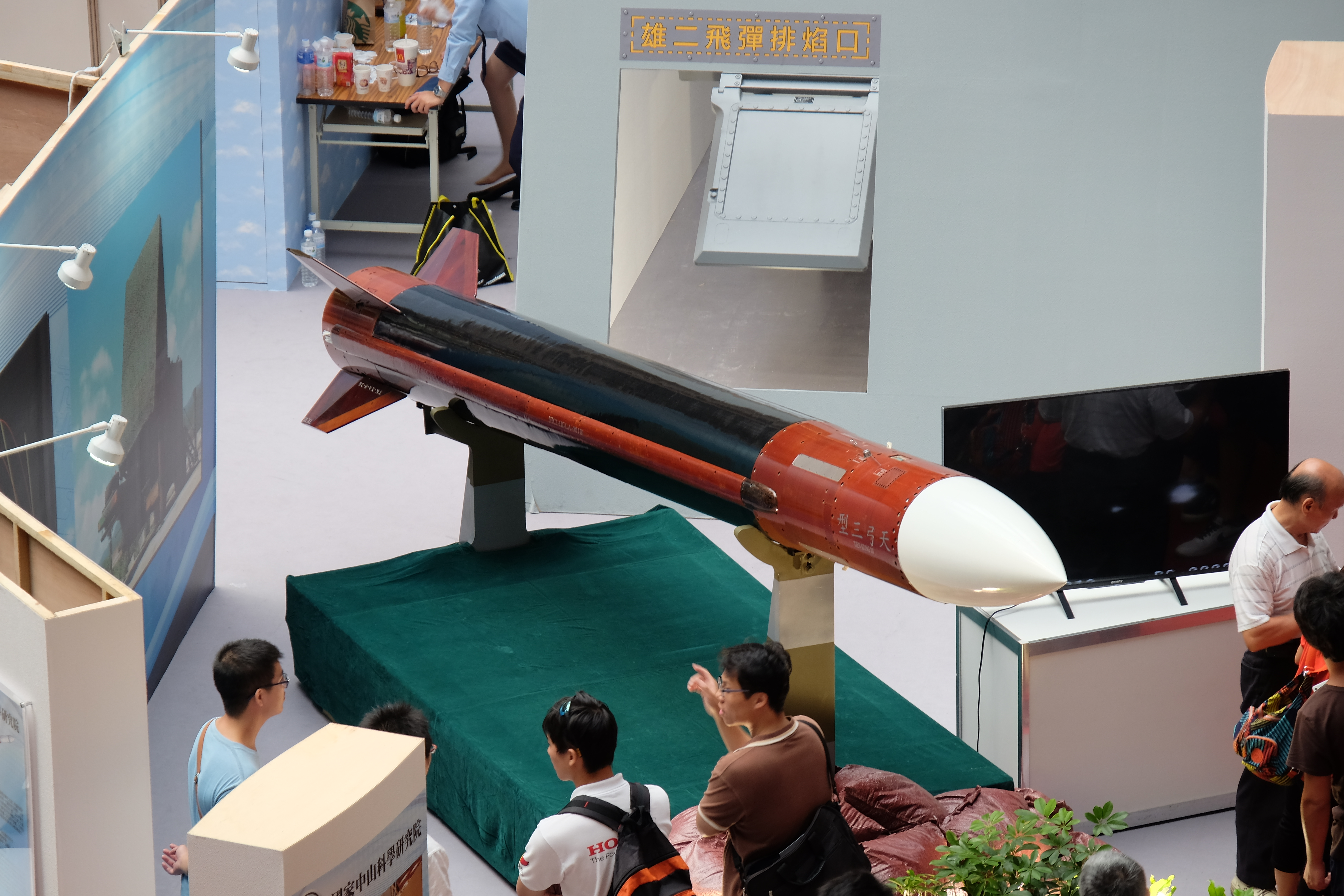 2015台北國際航太暨國防工業展覽會第三日，國防館展示中之天弓三型防空飛彈模型。